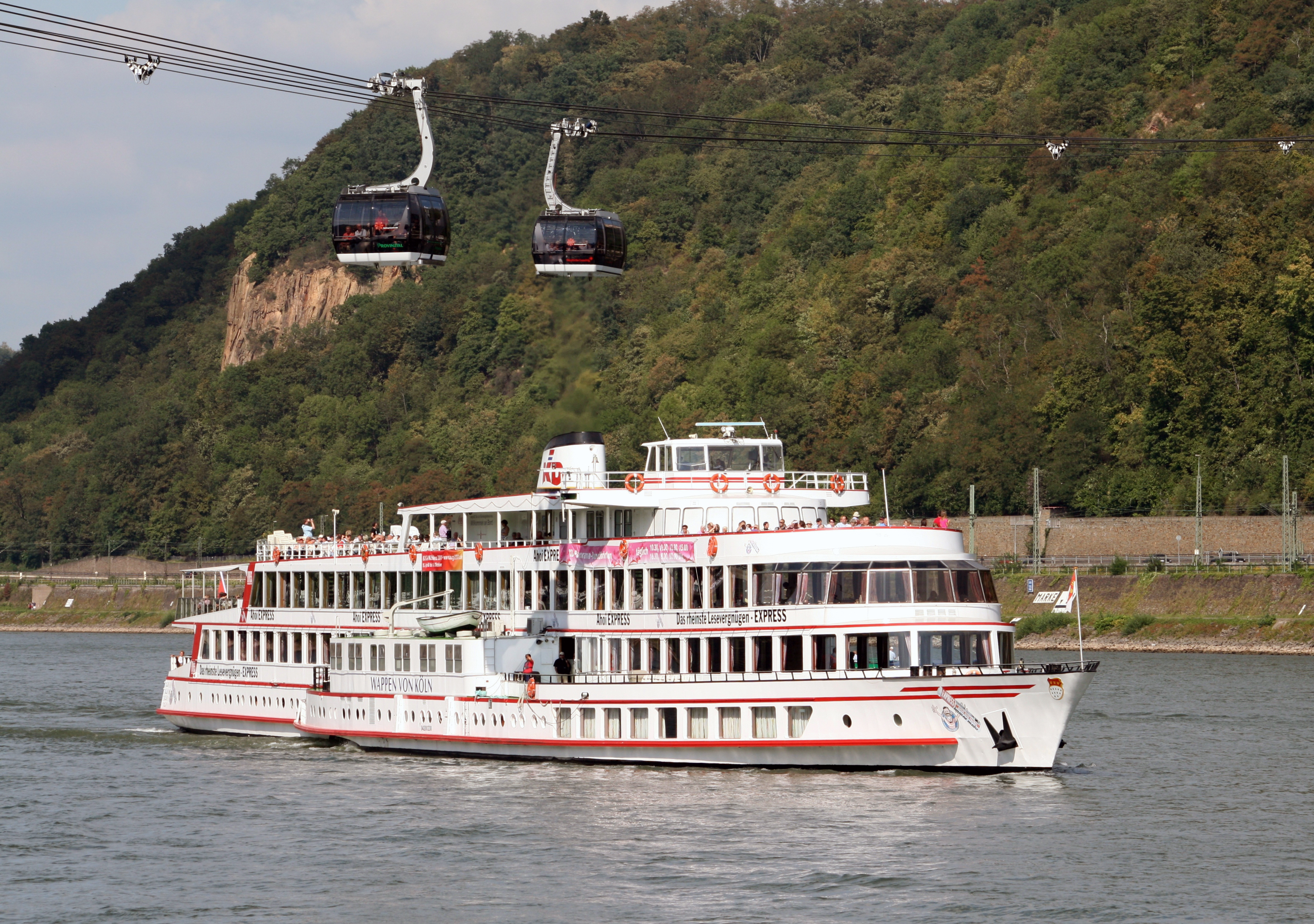 Das Köln-Düsseldorfer Fahrgastschiff auf dem Rhein bei Koblenz . Über dem Schiff sind Gondeln der Seilbahn in Koblenz zu sehen . Die Seilbahn verbindet das Deutsche Eck mit der Festung Ehrenbreitstein und war eine der Hauptattraktionen der Bundesgartenschau BUGA 2011.